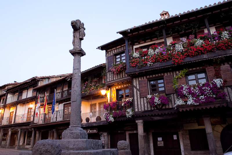 Escenas de La Alberca, Salamanca